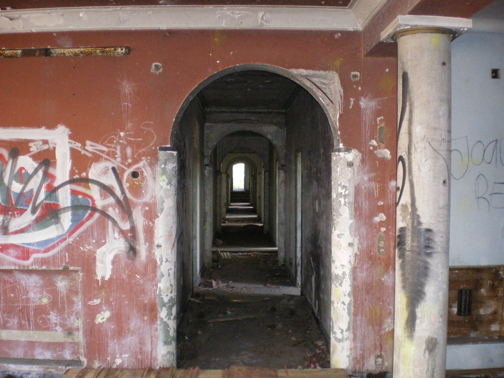 Hotel que servia o complexo turístico do Muxito